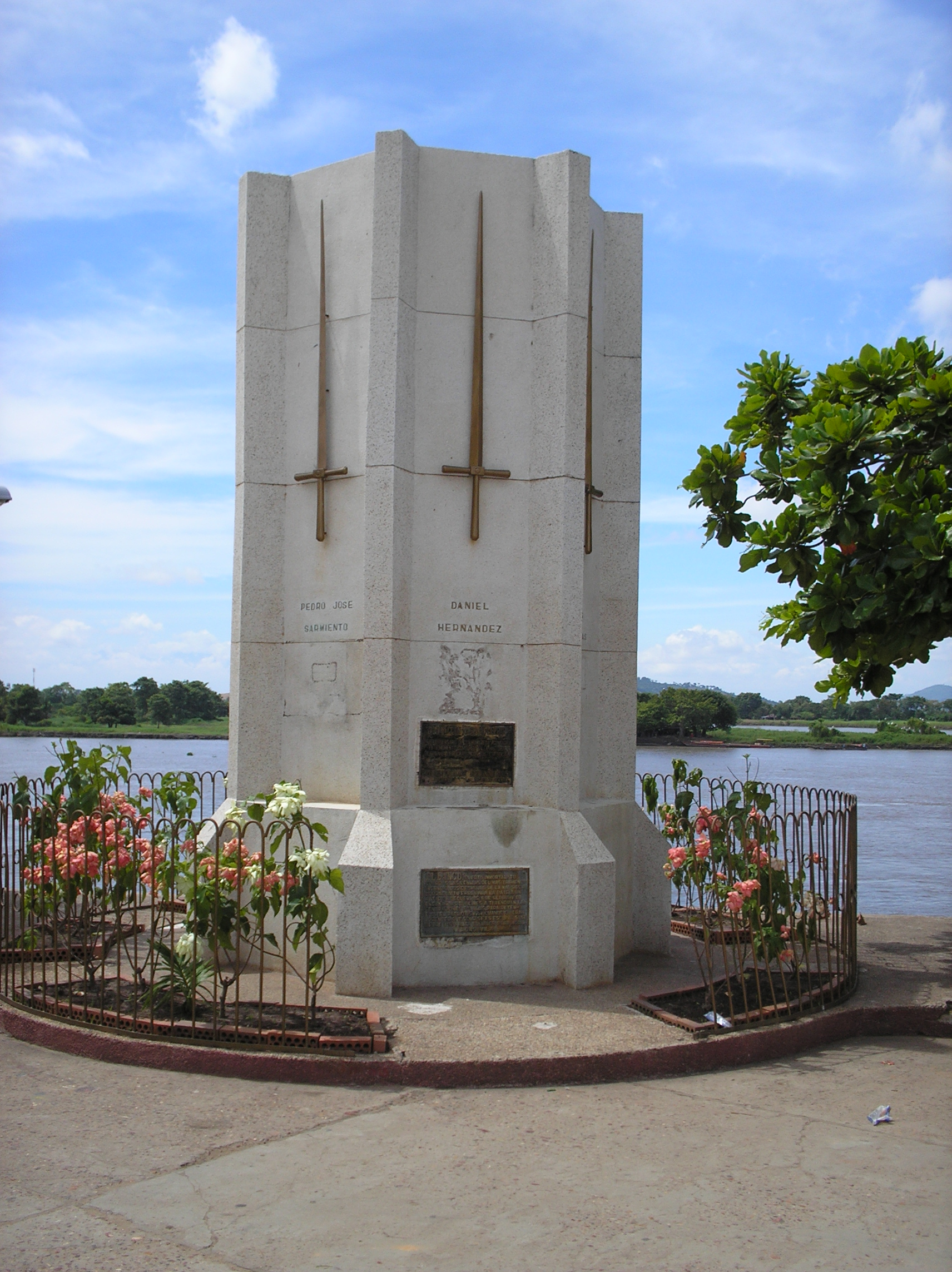 Monumento a los Heroes de la Batalla de la Humareda, ubicado frente al atrio de la catedral Nuestra Señora de la Candelaria en El Banco (Magdalena)